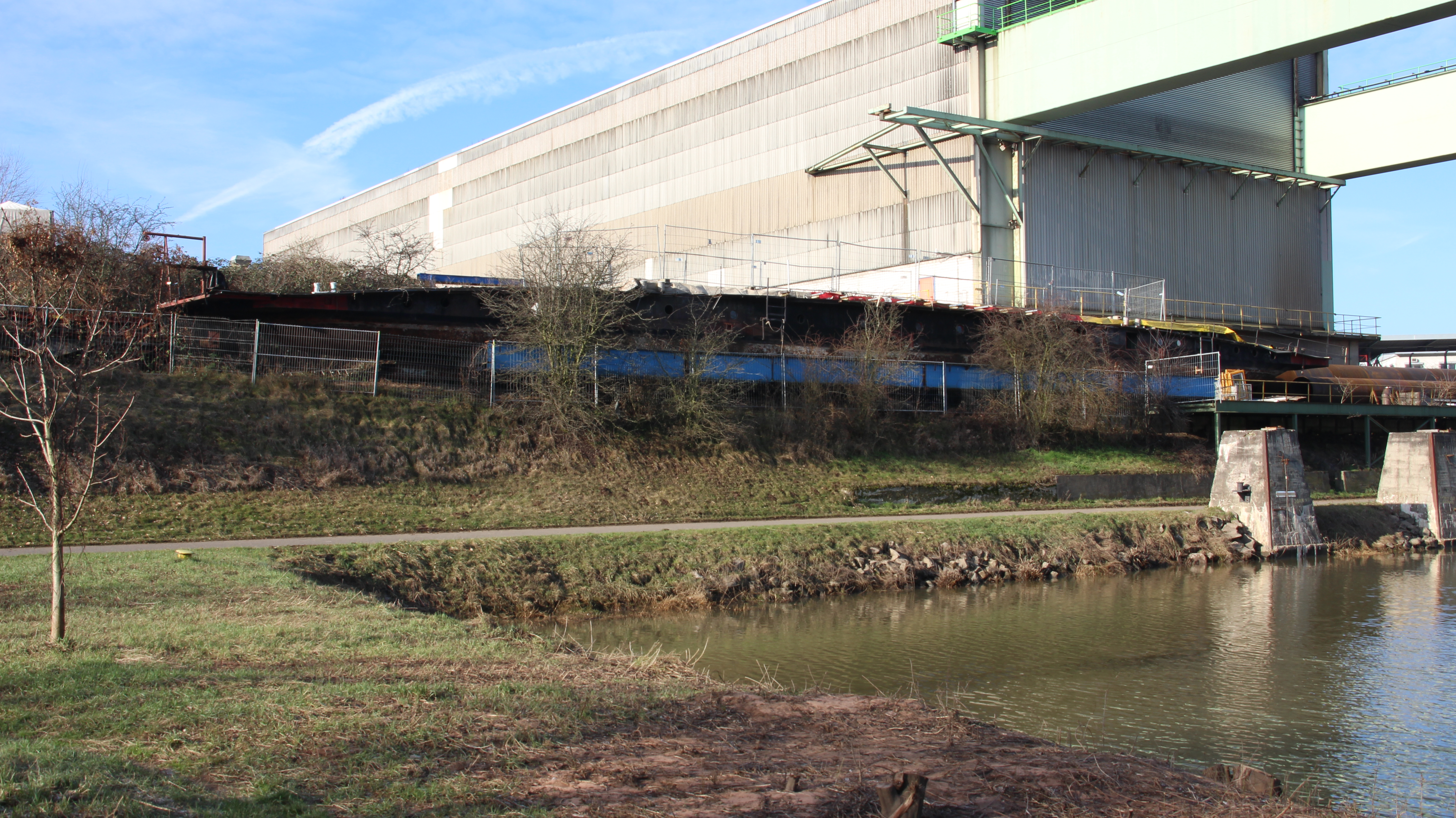 Die Reste der letzten "Meekuh". Aufgenommen in Aschaffenburg